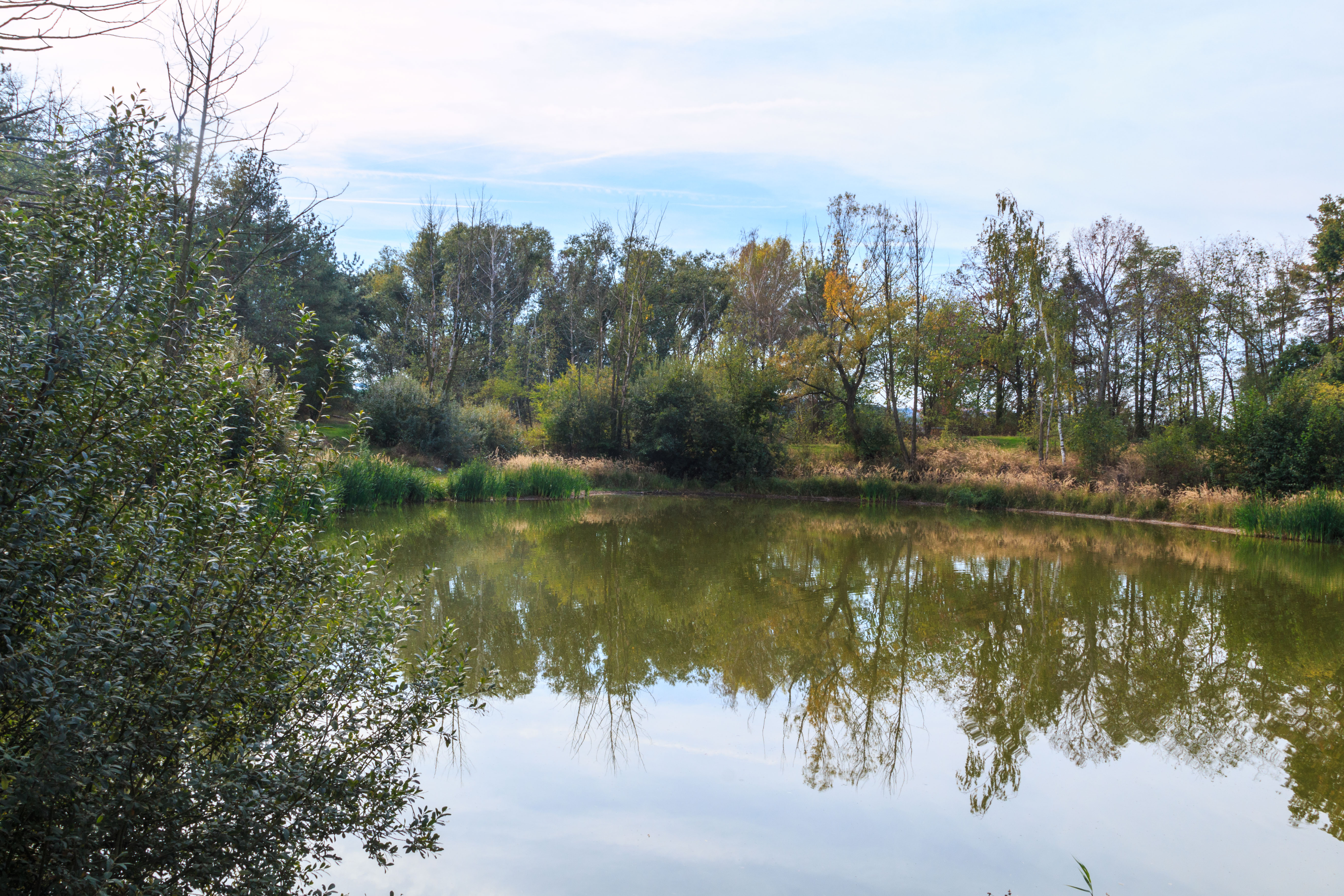 Písník pod Trávníkem Project: Vodstvo.